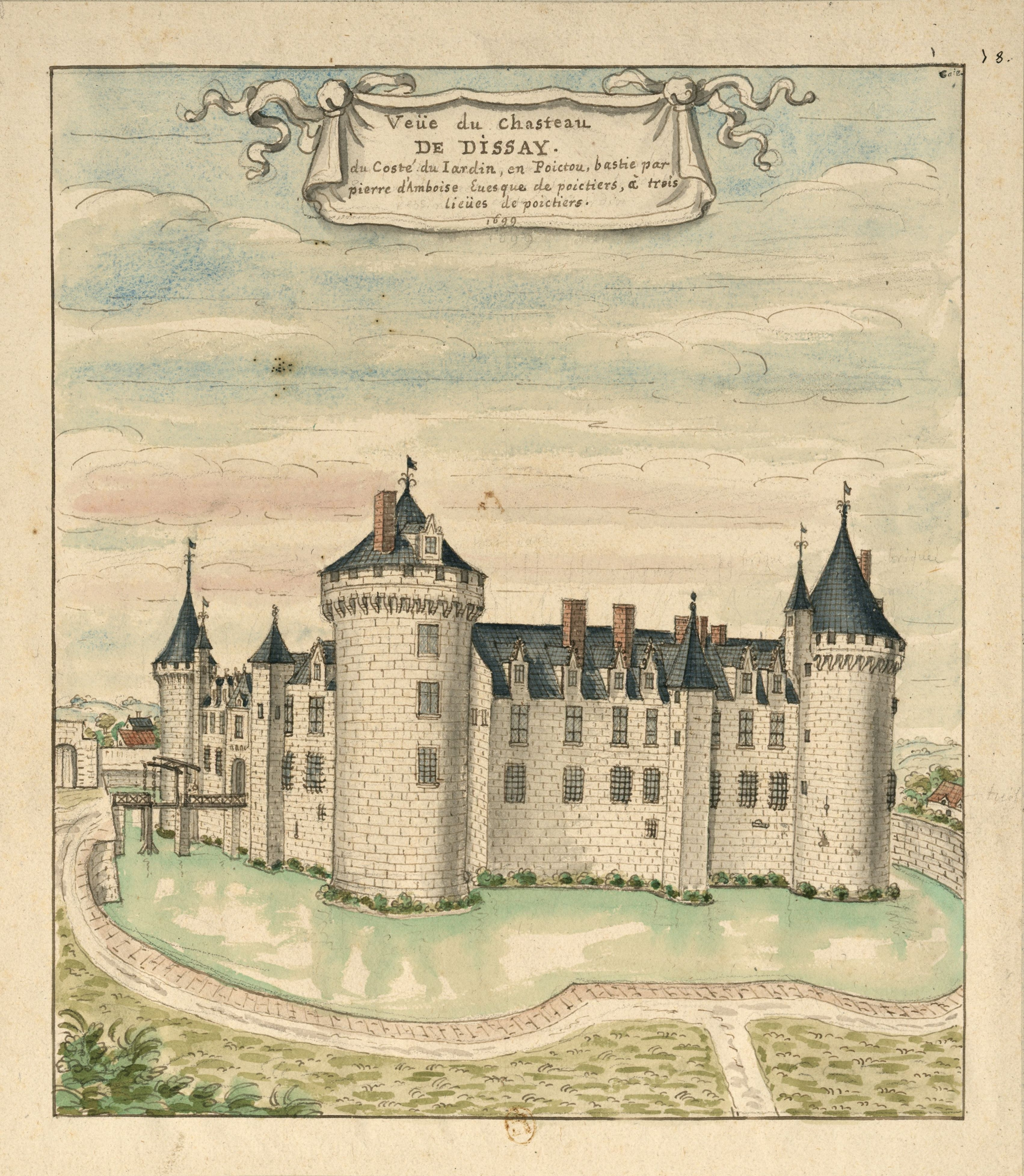 Veüe du chasteau de Dissay, du costé du Iardin, en Poictou, bastie par pierre d'Amboise Evesque de poictiers, à trois lieües de poictiers // 1699